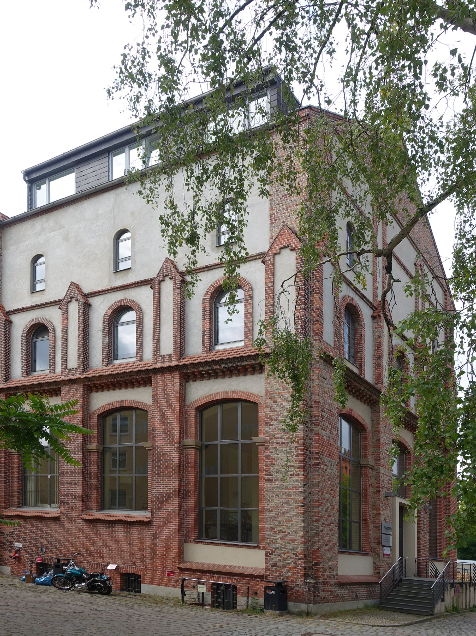 Institutsgebäude